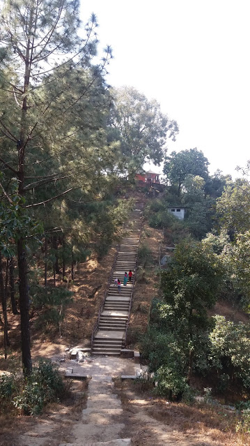 नेपाली: सुवर्णेश्वर महादेव, भक्तपुर